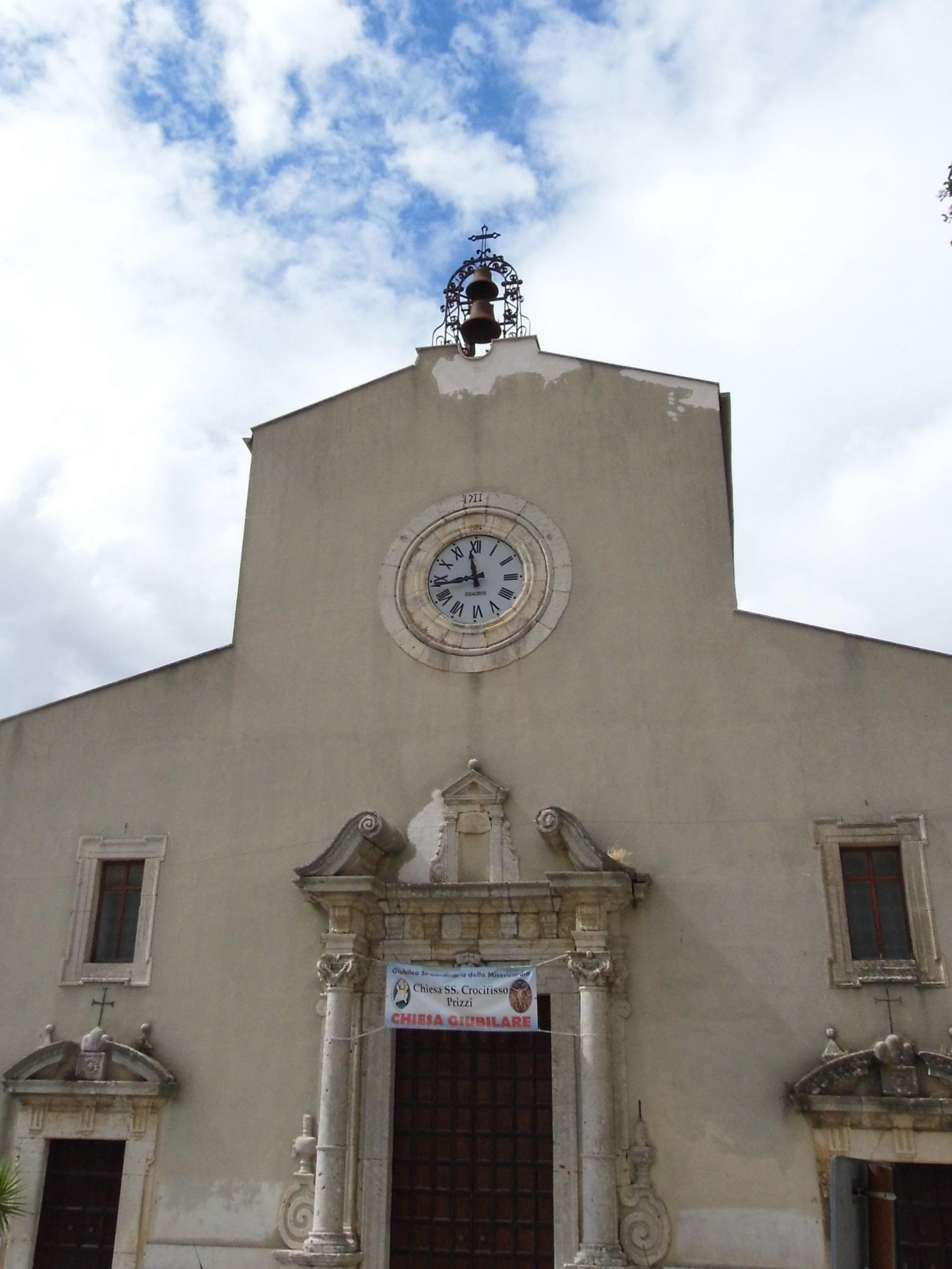 Chiesa del Santissimo Crocefisso This is a photo of a monument which is part of cultural heritage of Italy.